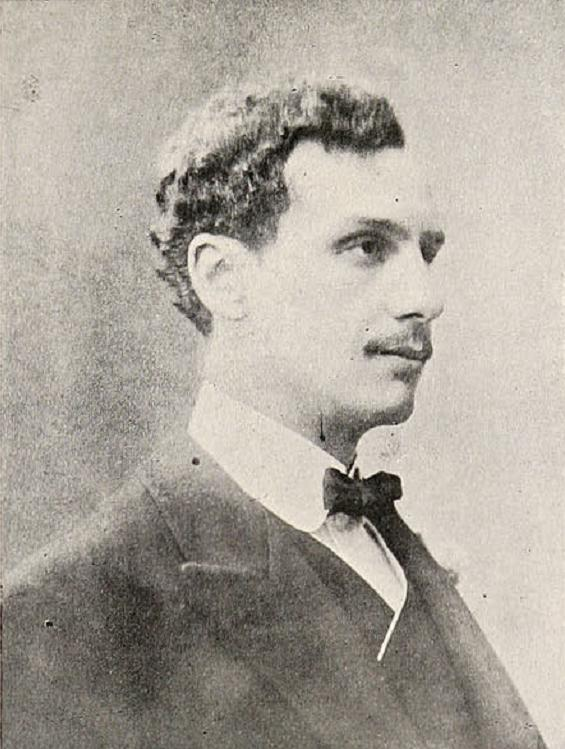 Augusto Jorge Goemine Thomson, más conocido como Augusto d'Halmar por el apellido de su bisabuelo materno, el barón d'Halmar (Valparaíso, 23 de abril de 1882 - Santiago, 27 de enero de 1950), fue un escritor chileno; se le otorgó el Premio Nacional de Literatura de 1942, creado ese mismo año. Destacó por ser un reconocido autor naturalista de Chile, además por ser uno de los primeros intelectuales del país en admitir su homosexualidad.